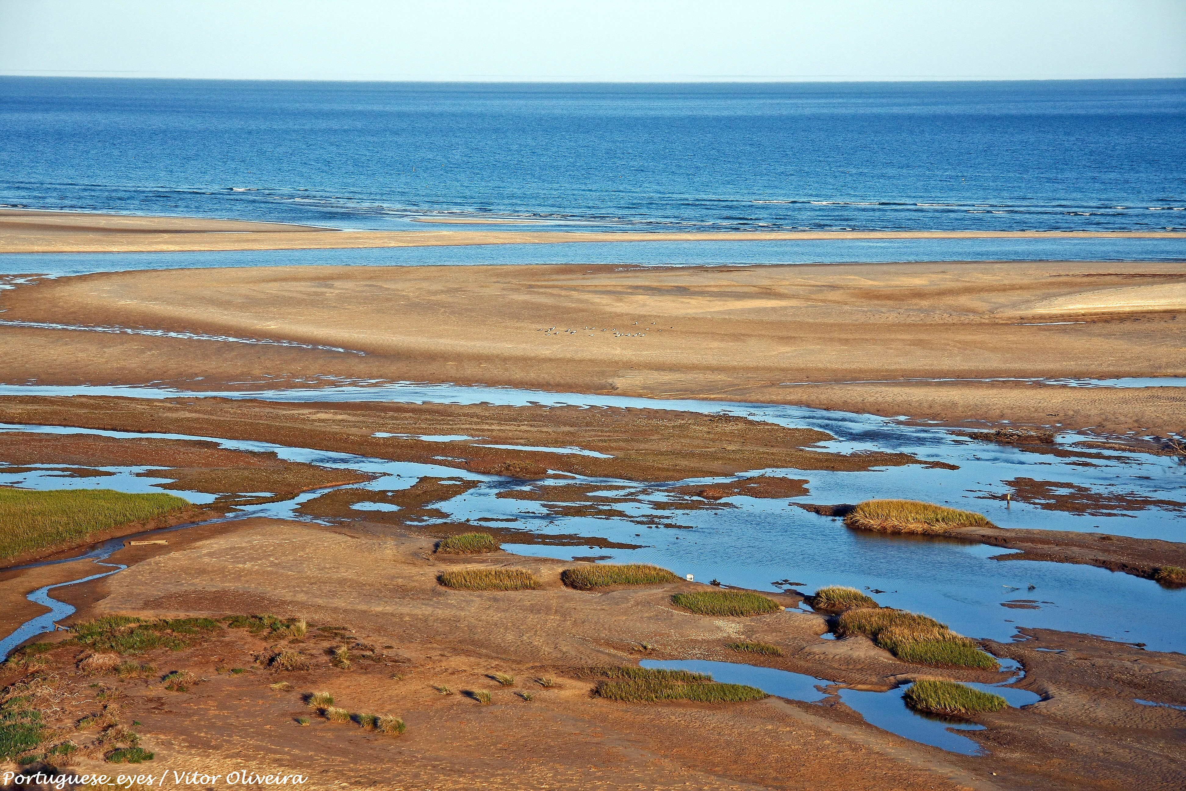 Ria Formosa - Portugal